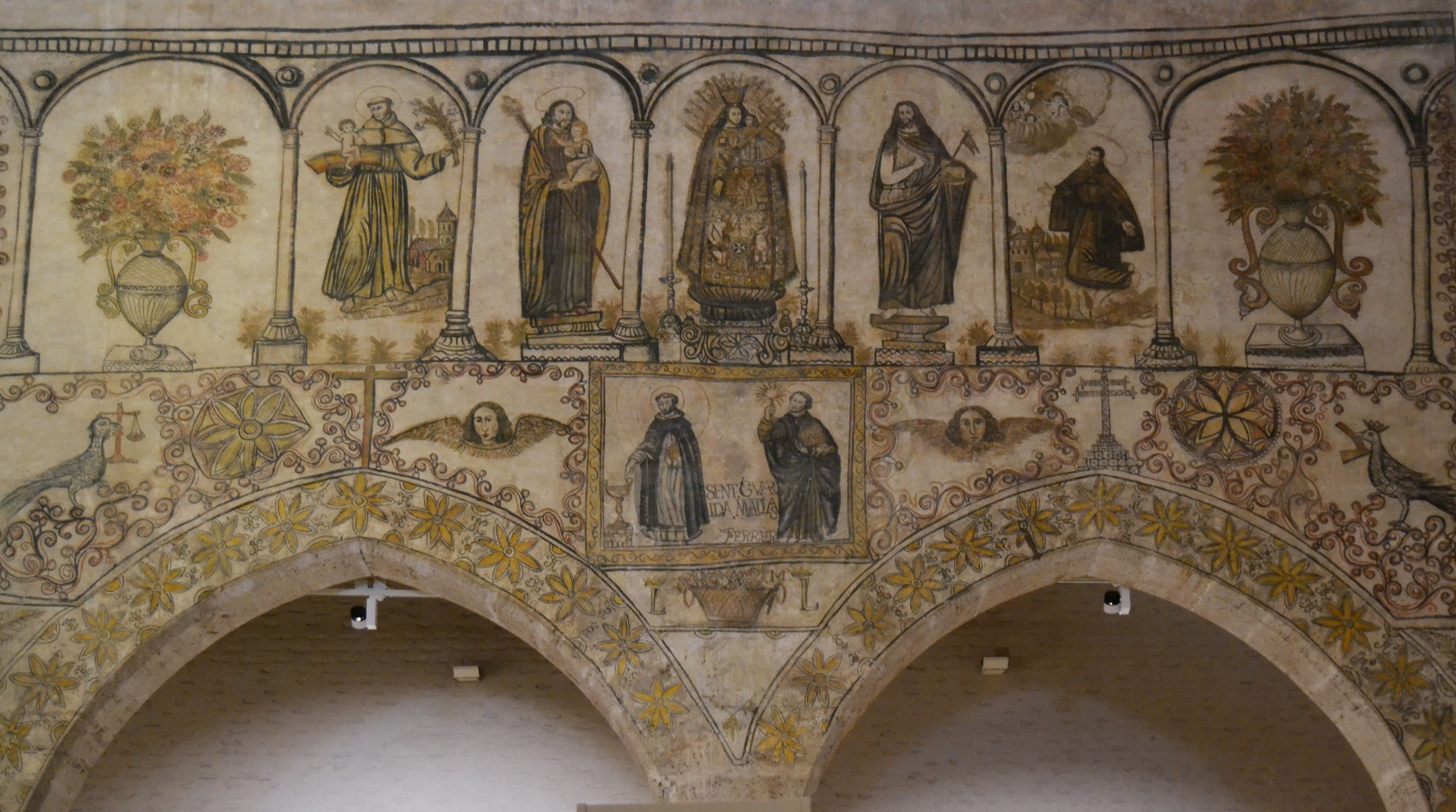 Pintures murals de l'Almodí de València.